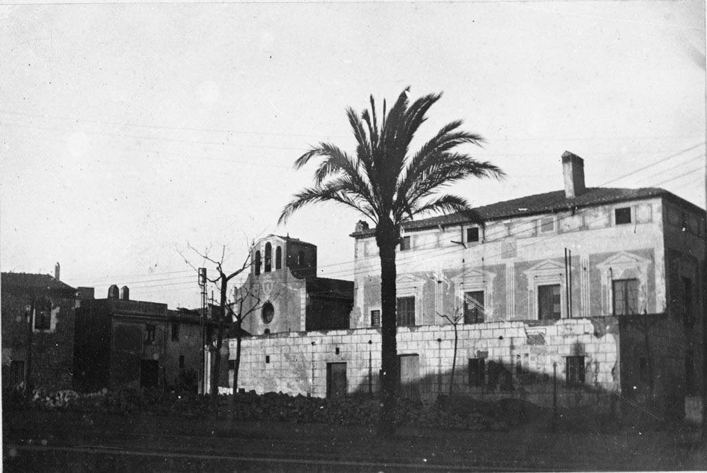 Façana de Can Basté, al passeig Fabra i Puig. Jordi Audet i Viñals (Entre 1926 i 1928)